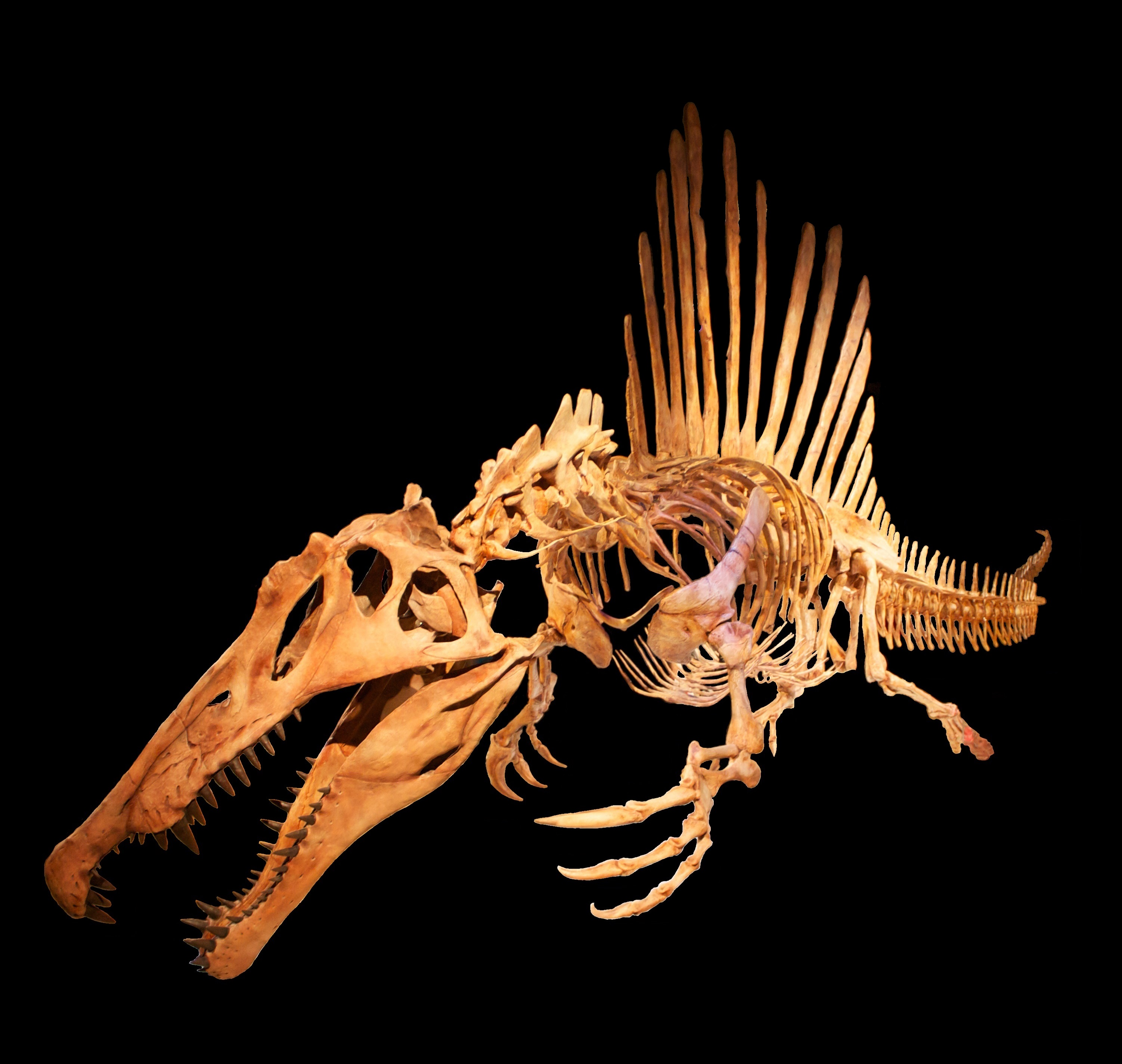 Spinosaurus